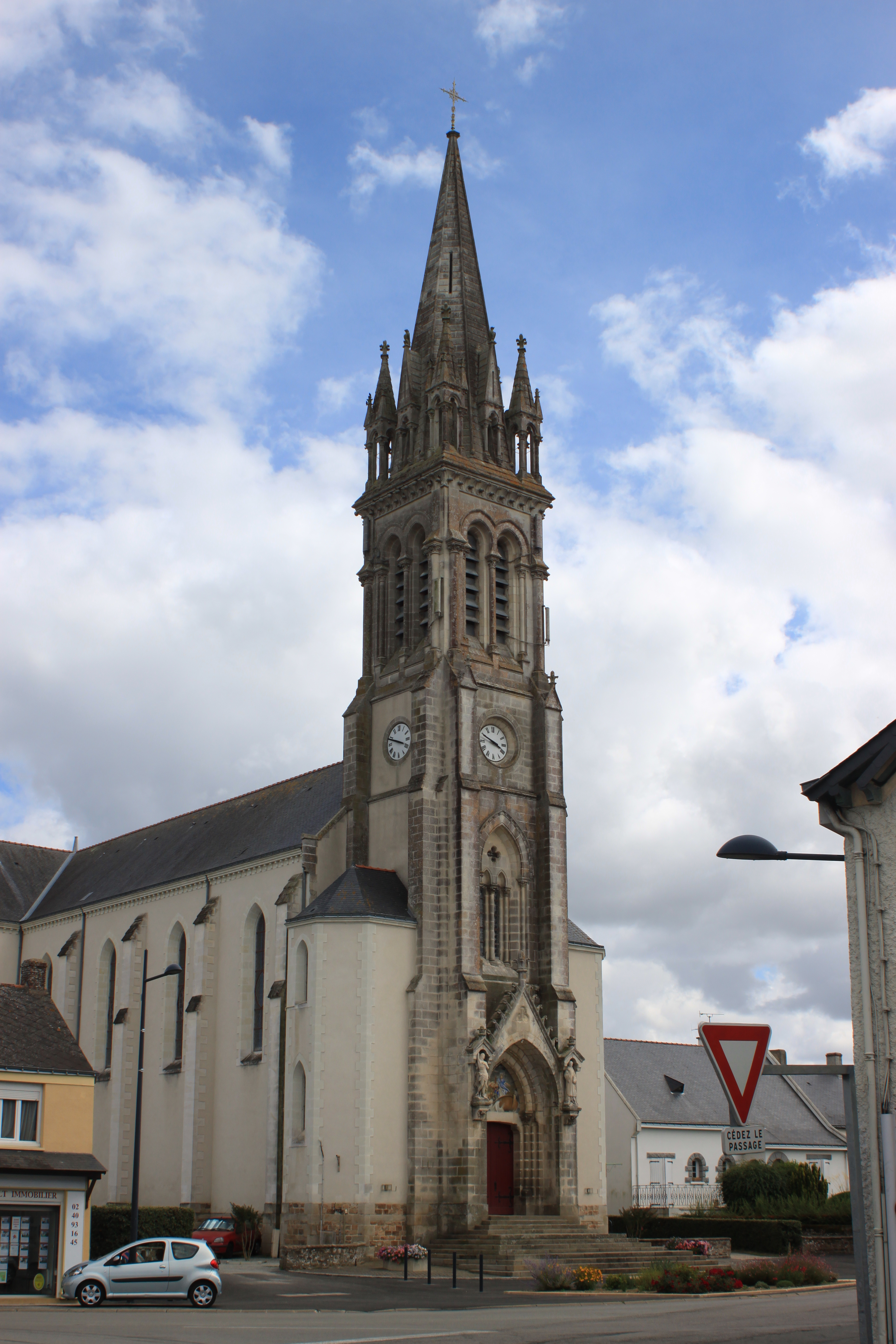 Église Saint-Pierre, Fr-44-Petit-Mars.